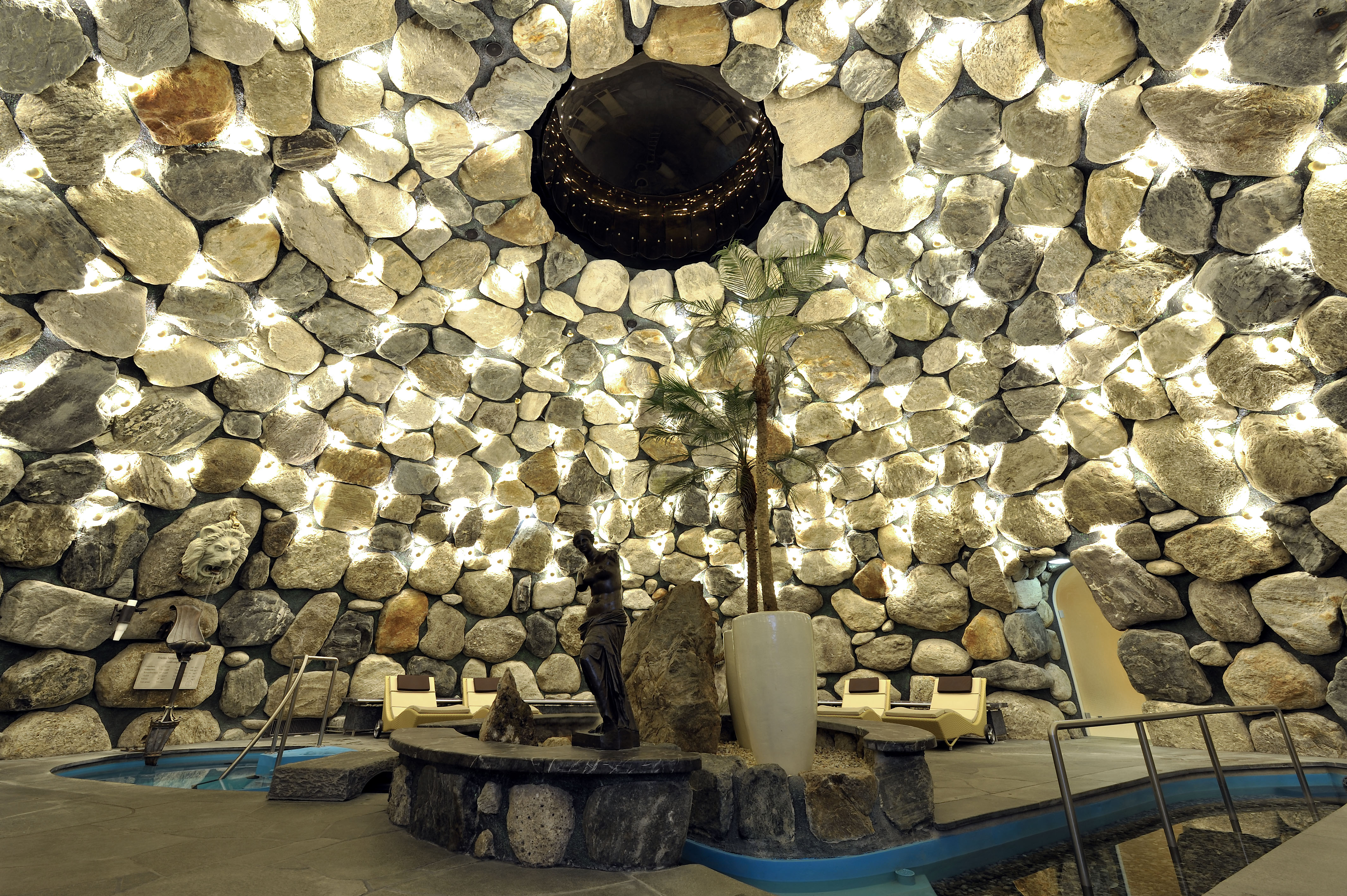 Dieses eindrucksvolle Tepidarium hat 100qm und einen Durchmesser von 11 Meter. Jeder einzelne Naturstein ist mit einer Metallkonstruktion am Betonrundbogen eingefasst. Das Tepidarium steht in Gaschurn im Sporthotel Silvretta Nova.